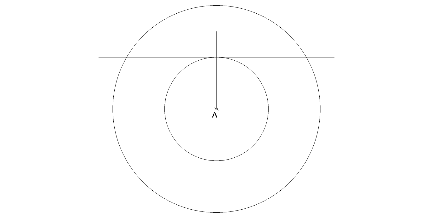 etape3